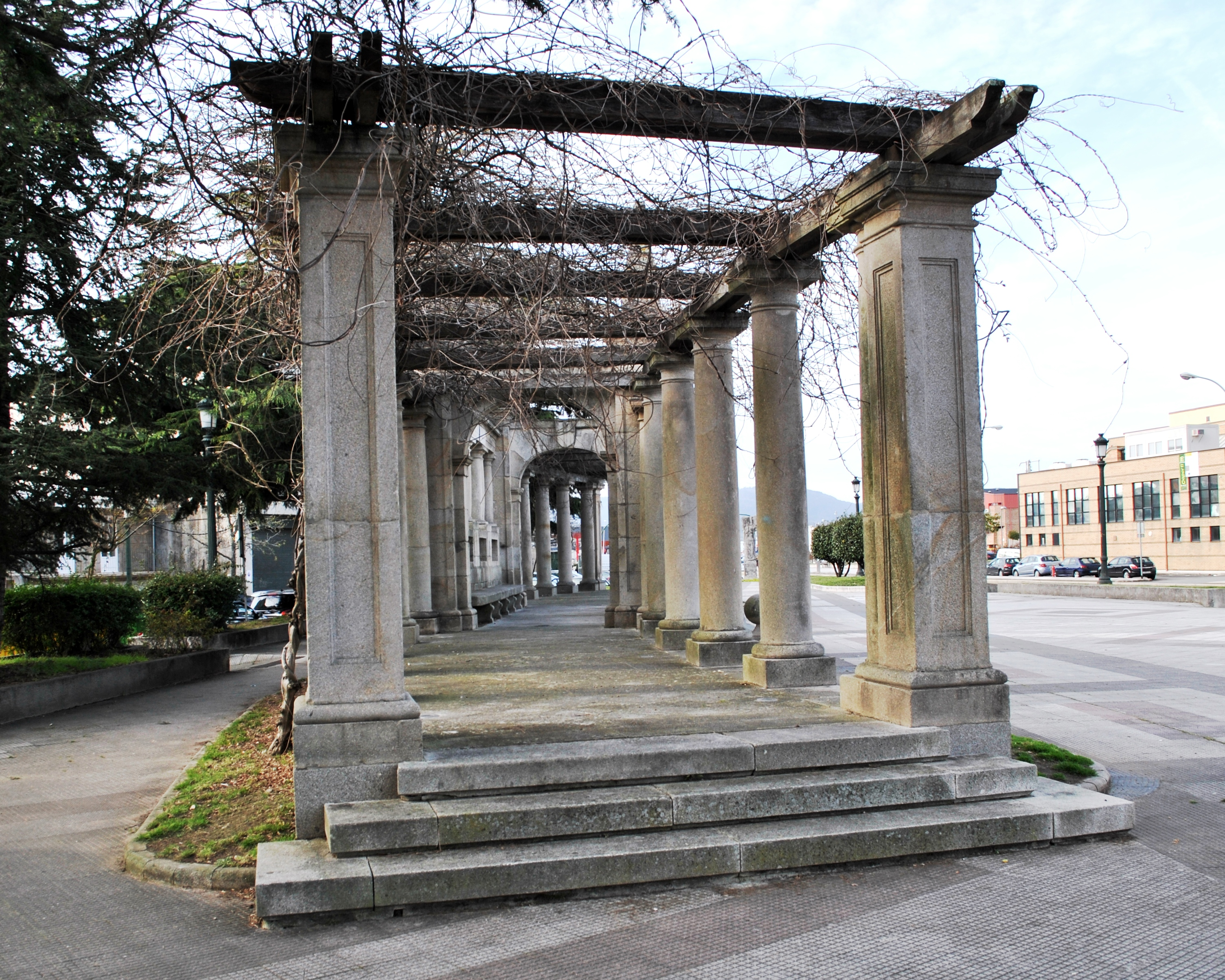 Véxase o título e as categorías.